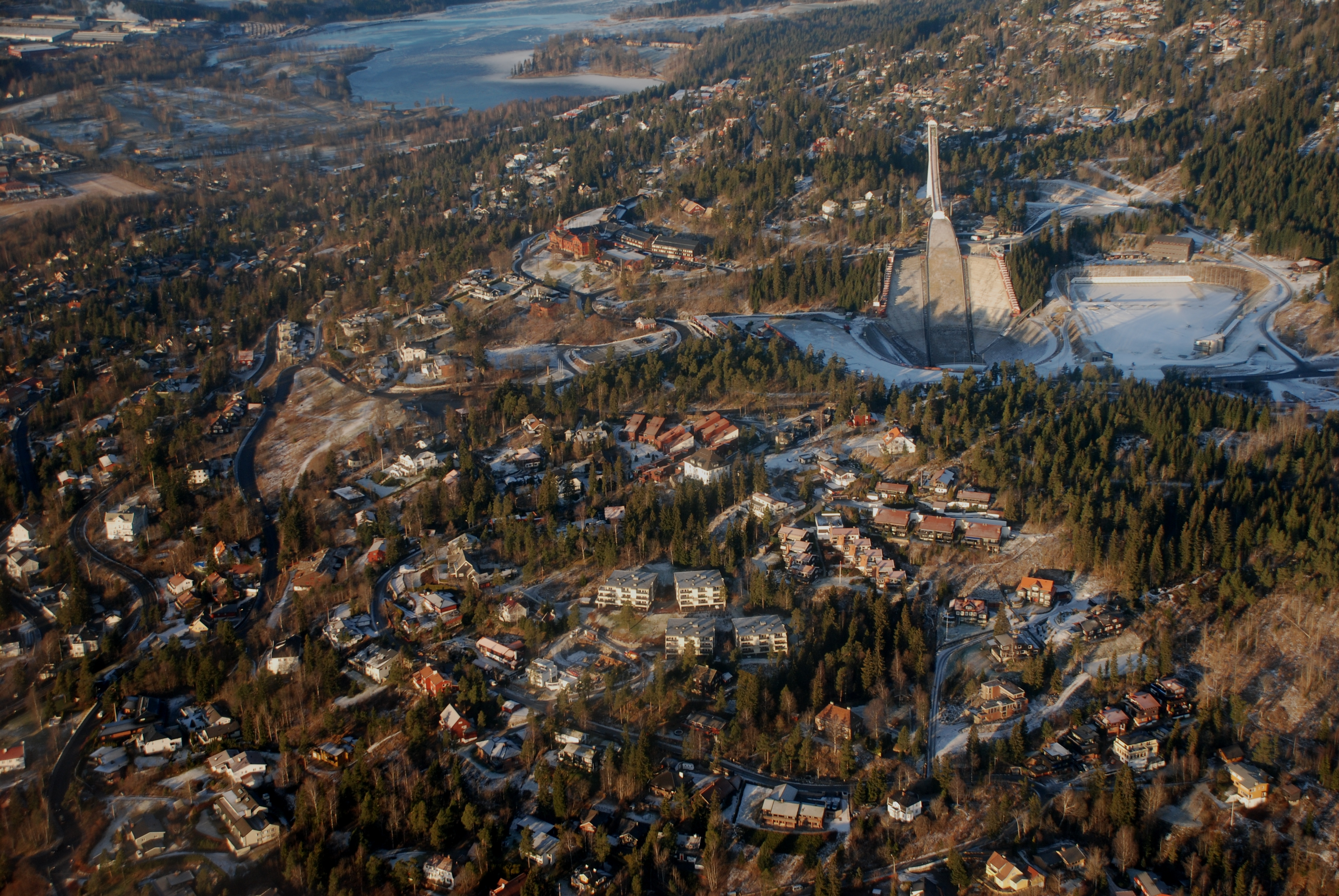 Holmenkollen, Oslo from air.